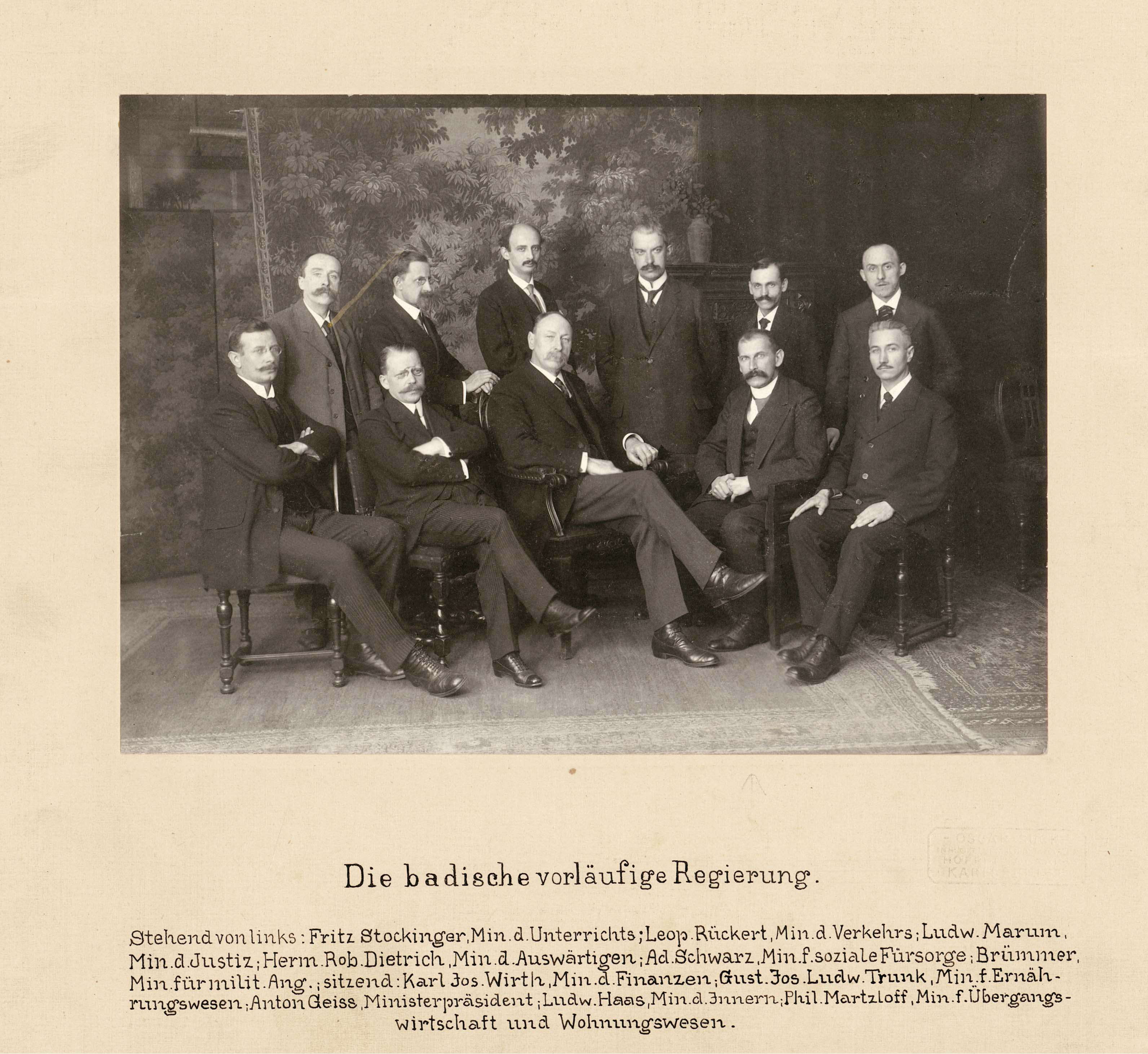 Gruppenfoto der am 10. November 1918 konstituierten badischen vorläufigen Regierung